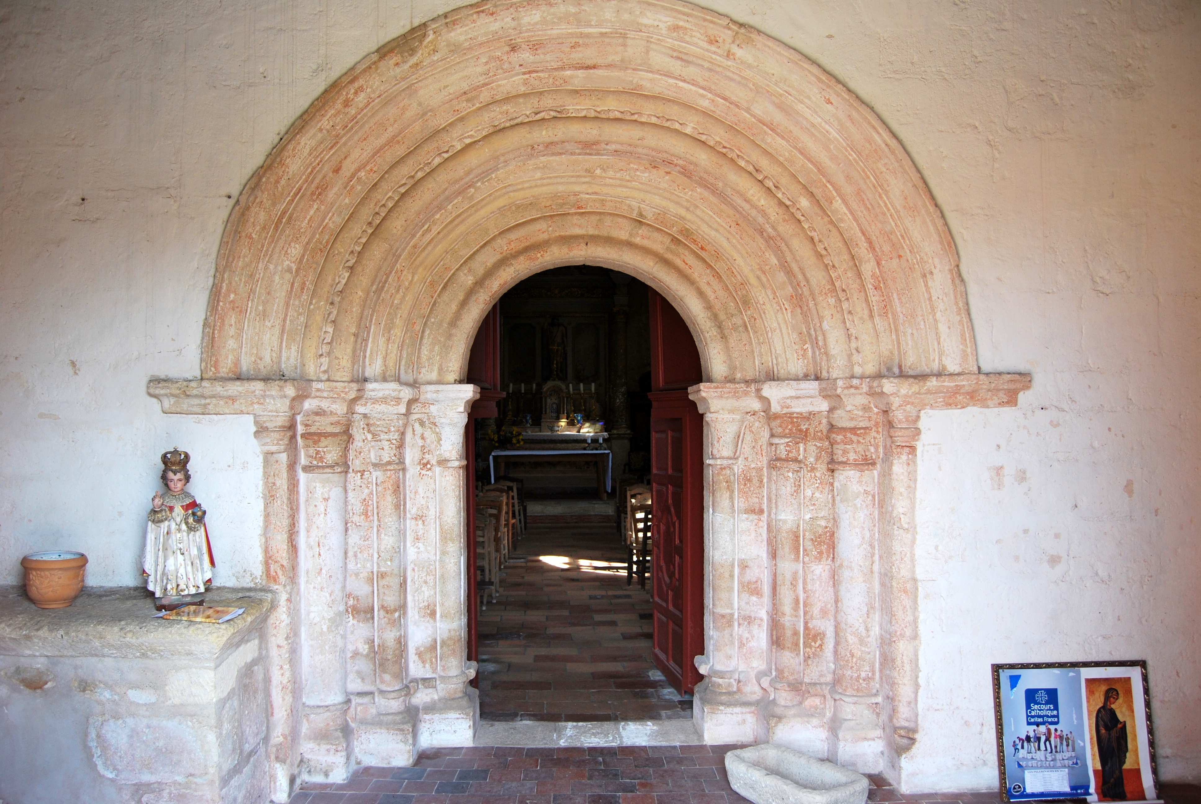 Église Saint-Jean-Baptiste de Cameyrac .